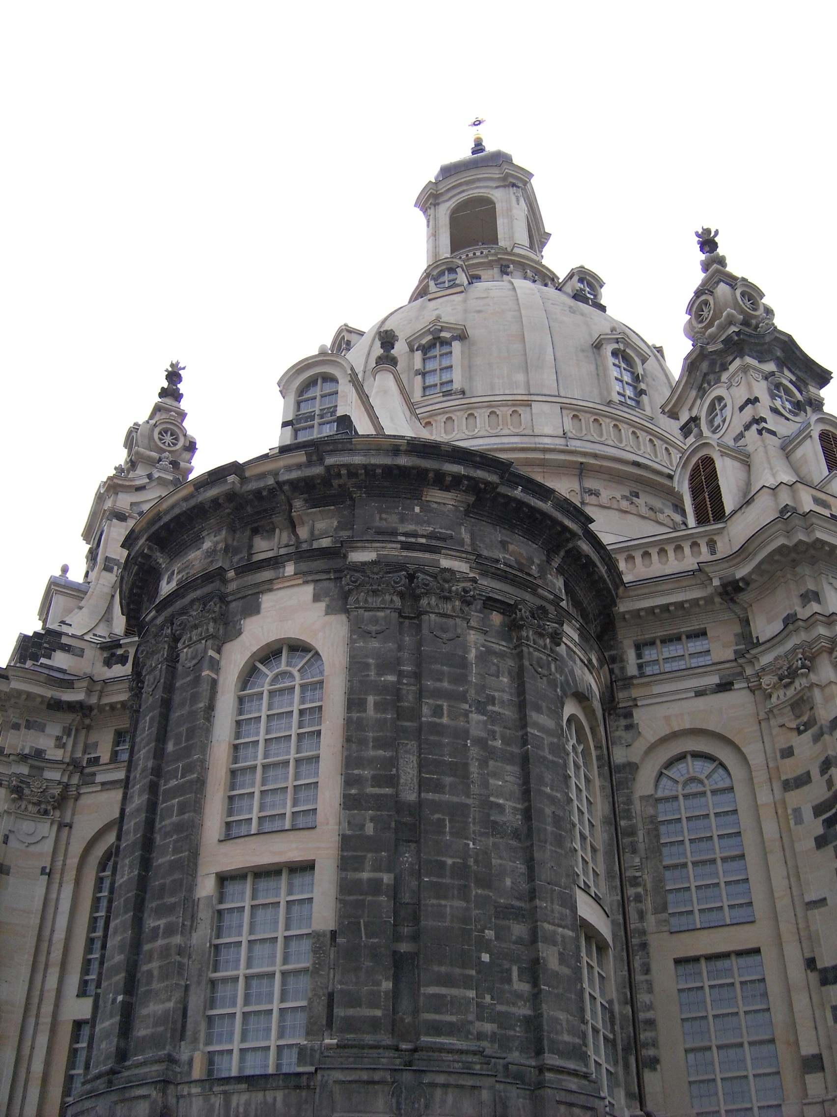 Dresden, Frauenkirche